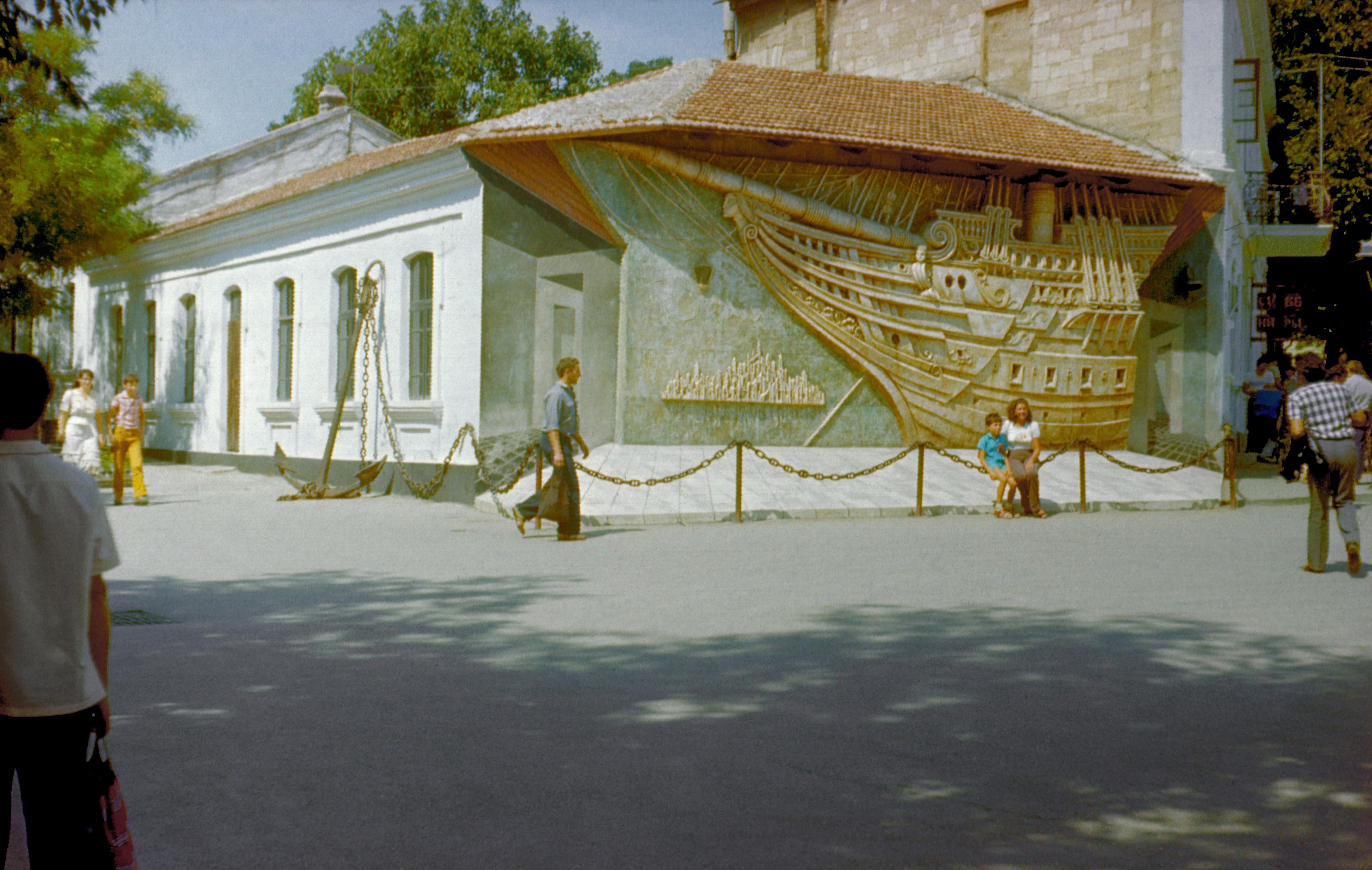 Будинок-музей О. С. Гріна, Феодосія, вул. Галерейна, 8–10, літ. А, А1, Б